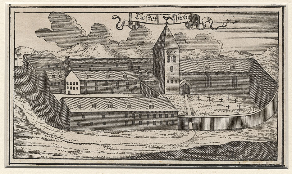 Stich von Anton Wilhelm Ertl: Closter Chiebach